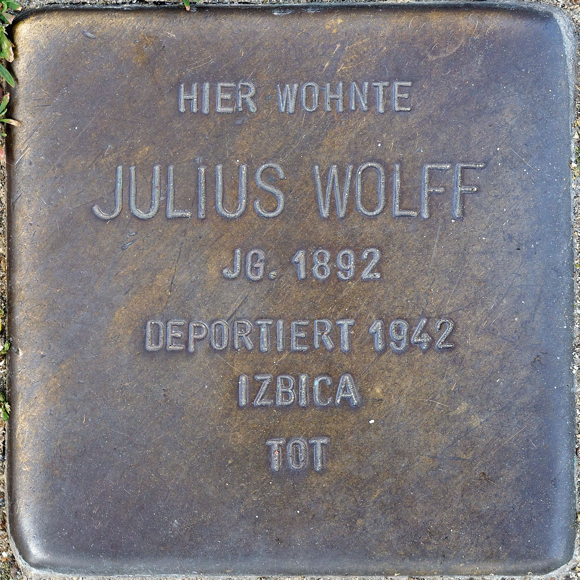 Stolpersteine MG: Wolff, Julius